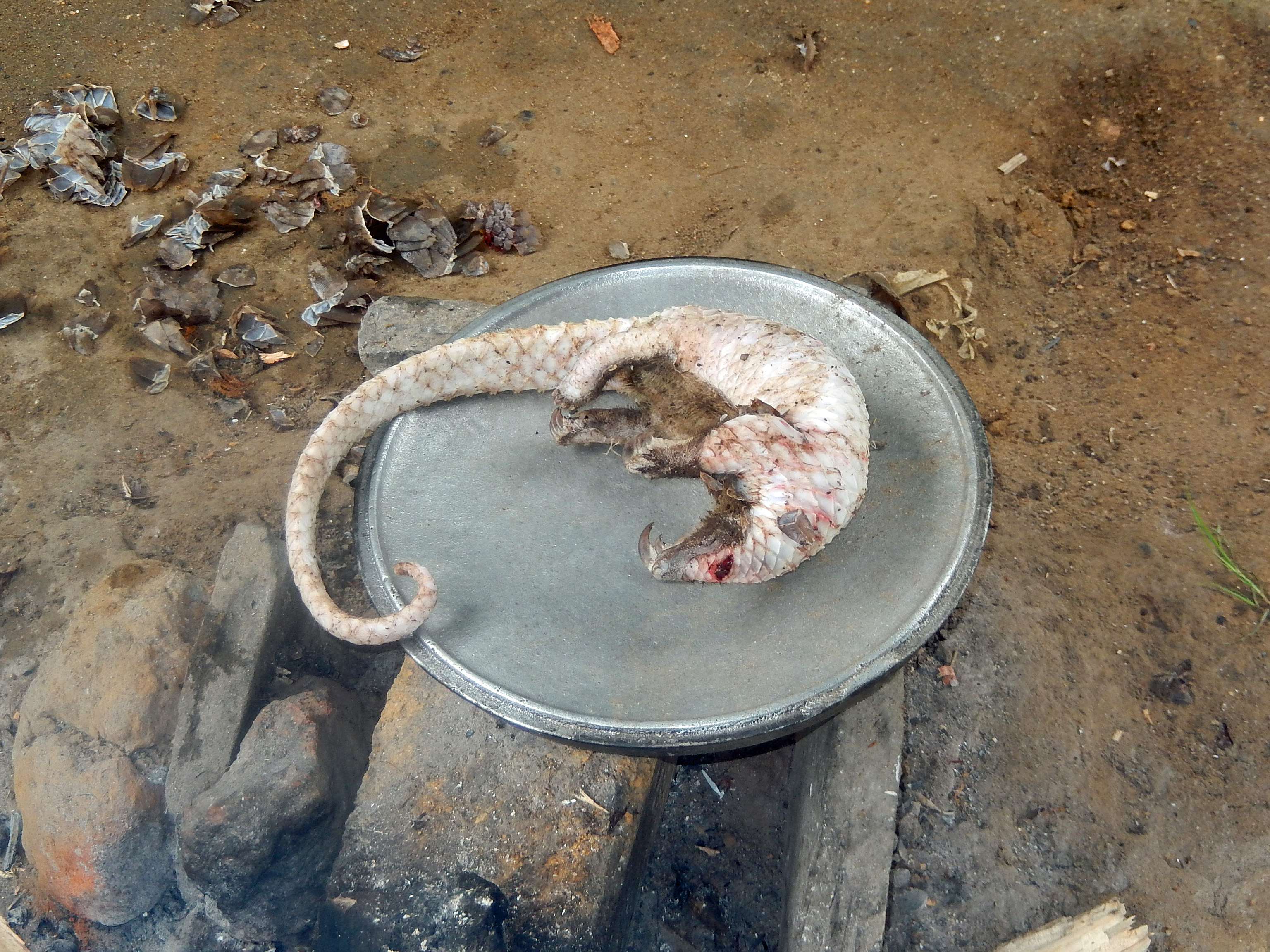 Préparation et cuisson du pangolin au Cameroun (Ngog-Mapubi, région du Centre)